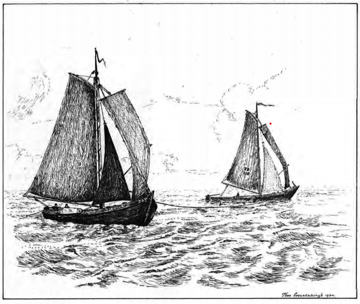 Tussen twee boten in wordt de wonderkuil door het water getrokken.